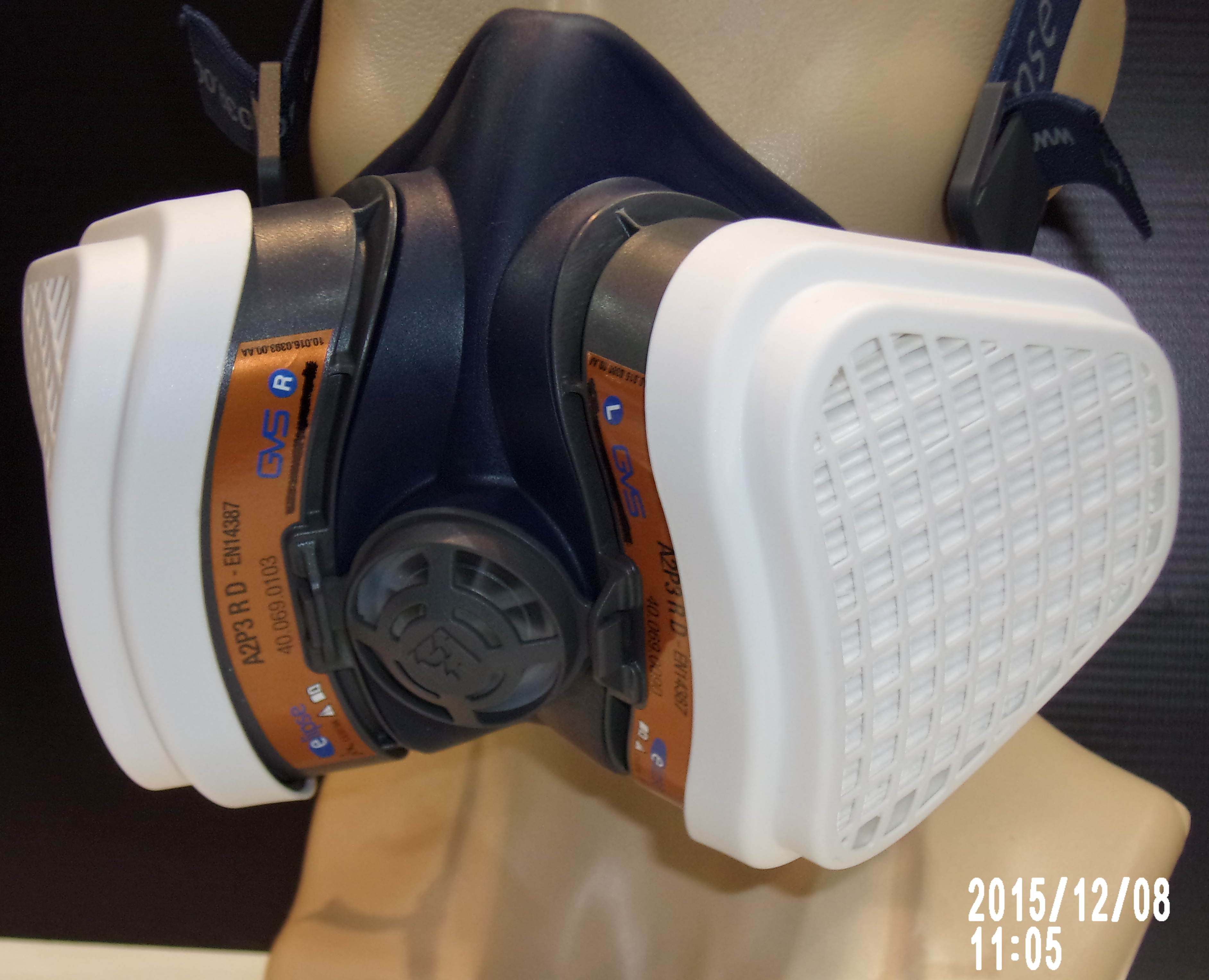 Респиратор - эластомерная полумаска с комбинированными фильтрами